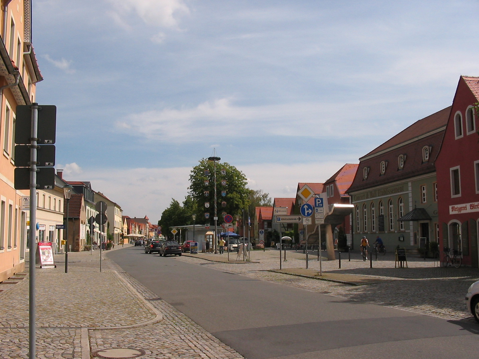 Altkoetzschenbroda Oberdorf